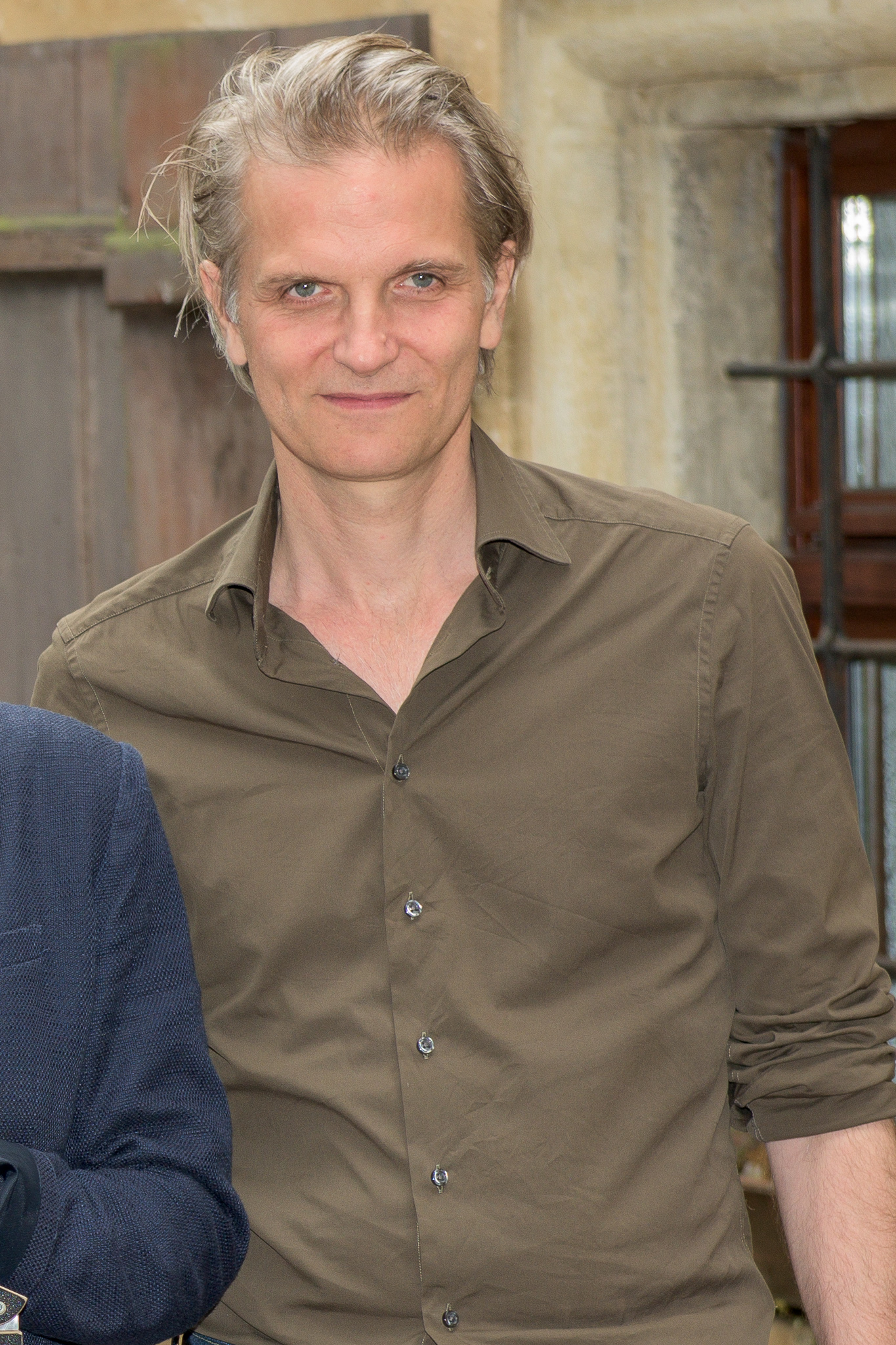 Andreas Senn,Bayerischer Rundfunk,Das Recht sich zu sorgen,Franken-Tatort,Tatort